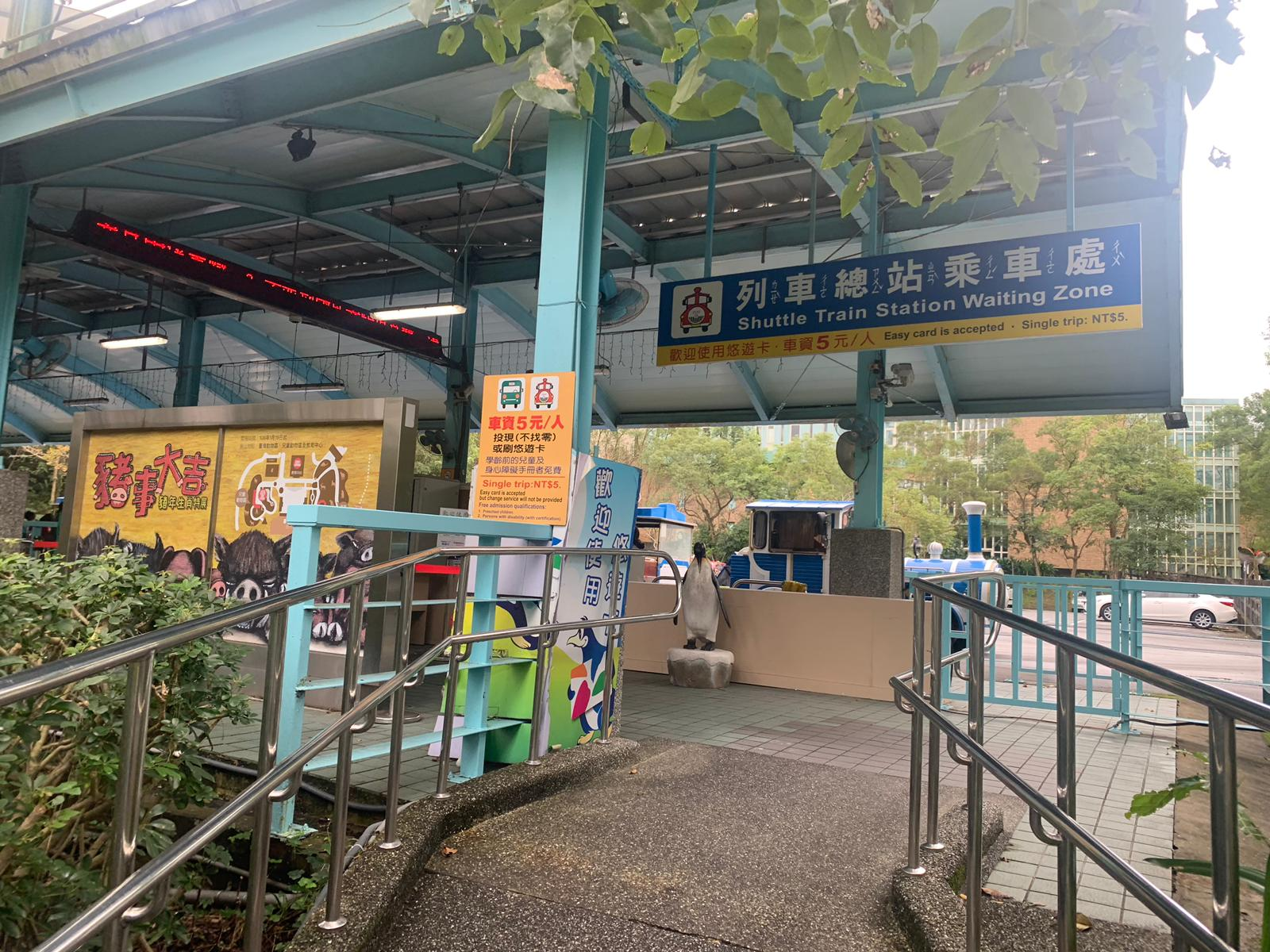 中文（台灣）: 臺北市立動物園接駁觀光列車乘車處